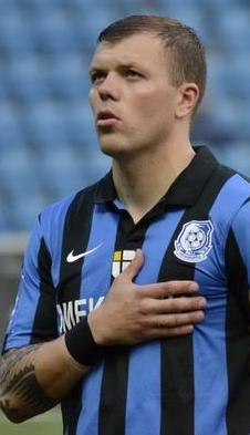 Олексій Гай - український футболіст, півзахисник за часів виступів за Чорноморець